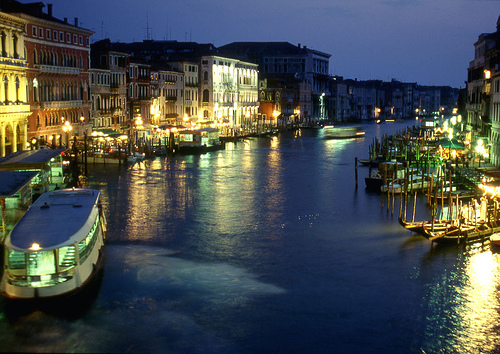 Canal Grande, Venezia, Italia